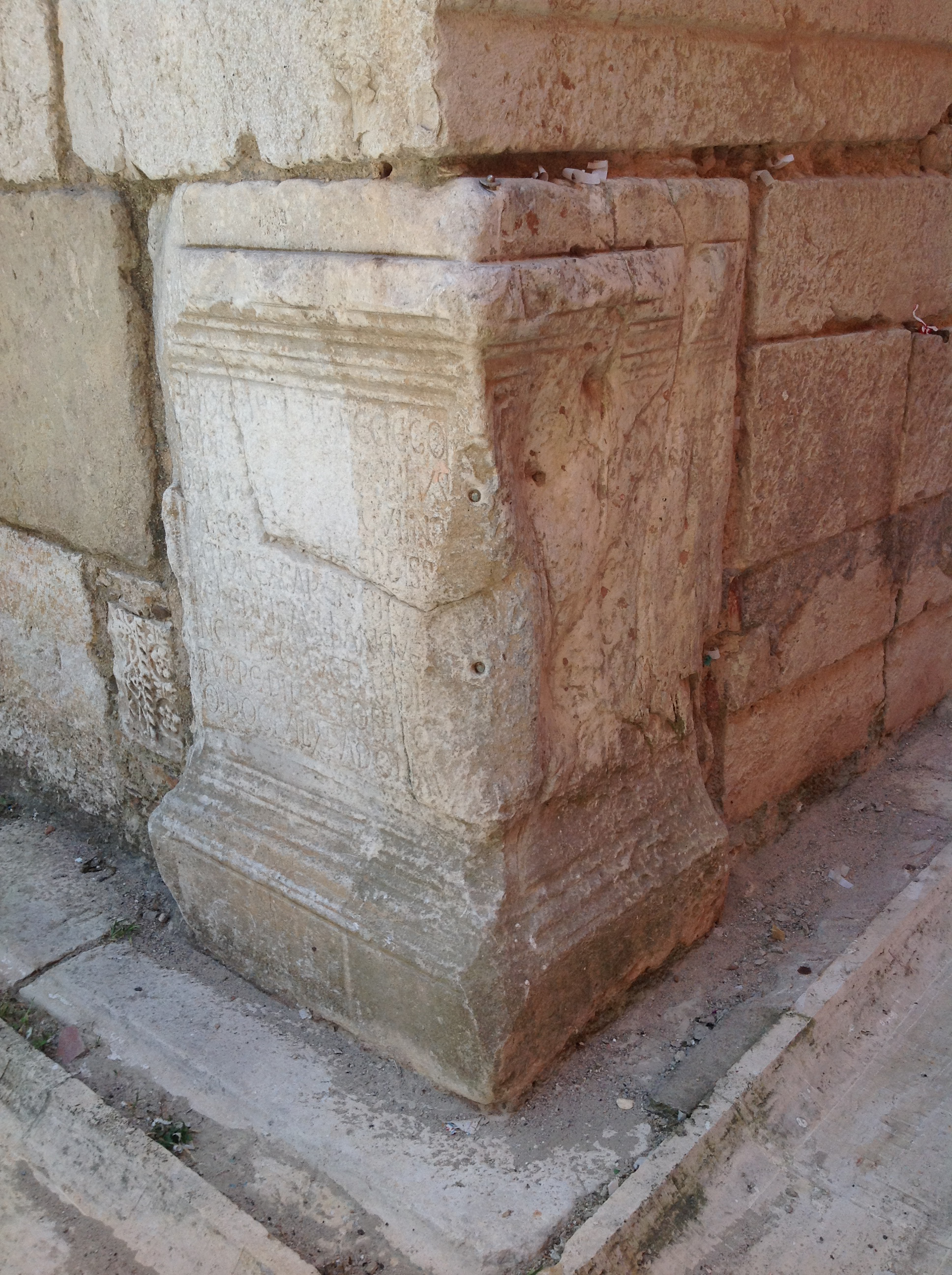 Cippo commemorativo della battaglia del Garigliano (915), posto all'angolo nord-occidentale del basamento del campanile.